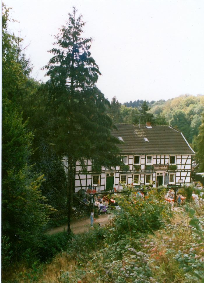 Ausflugslokal Rausmühle